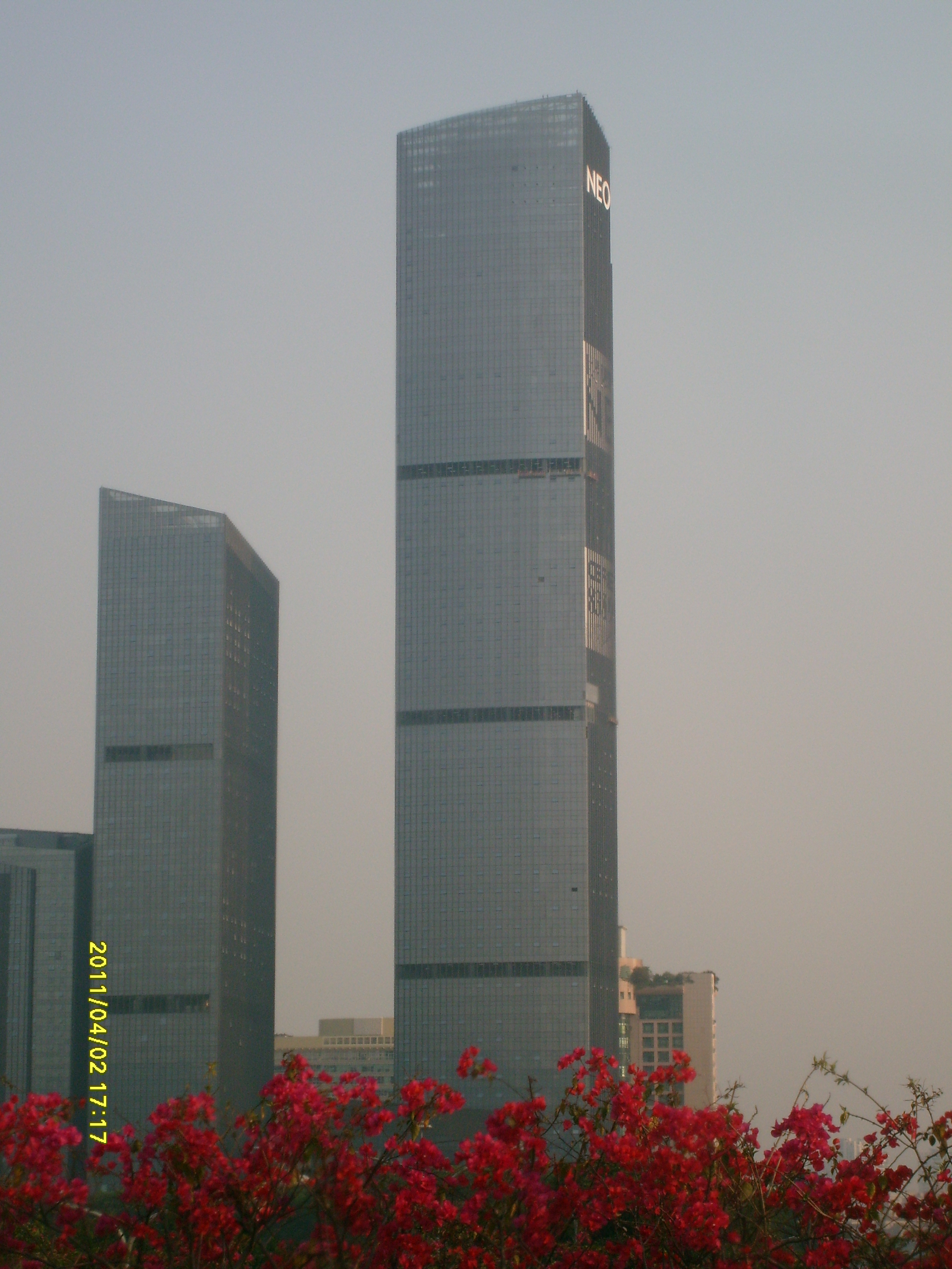 深圳摩天大楼